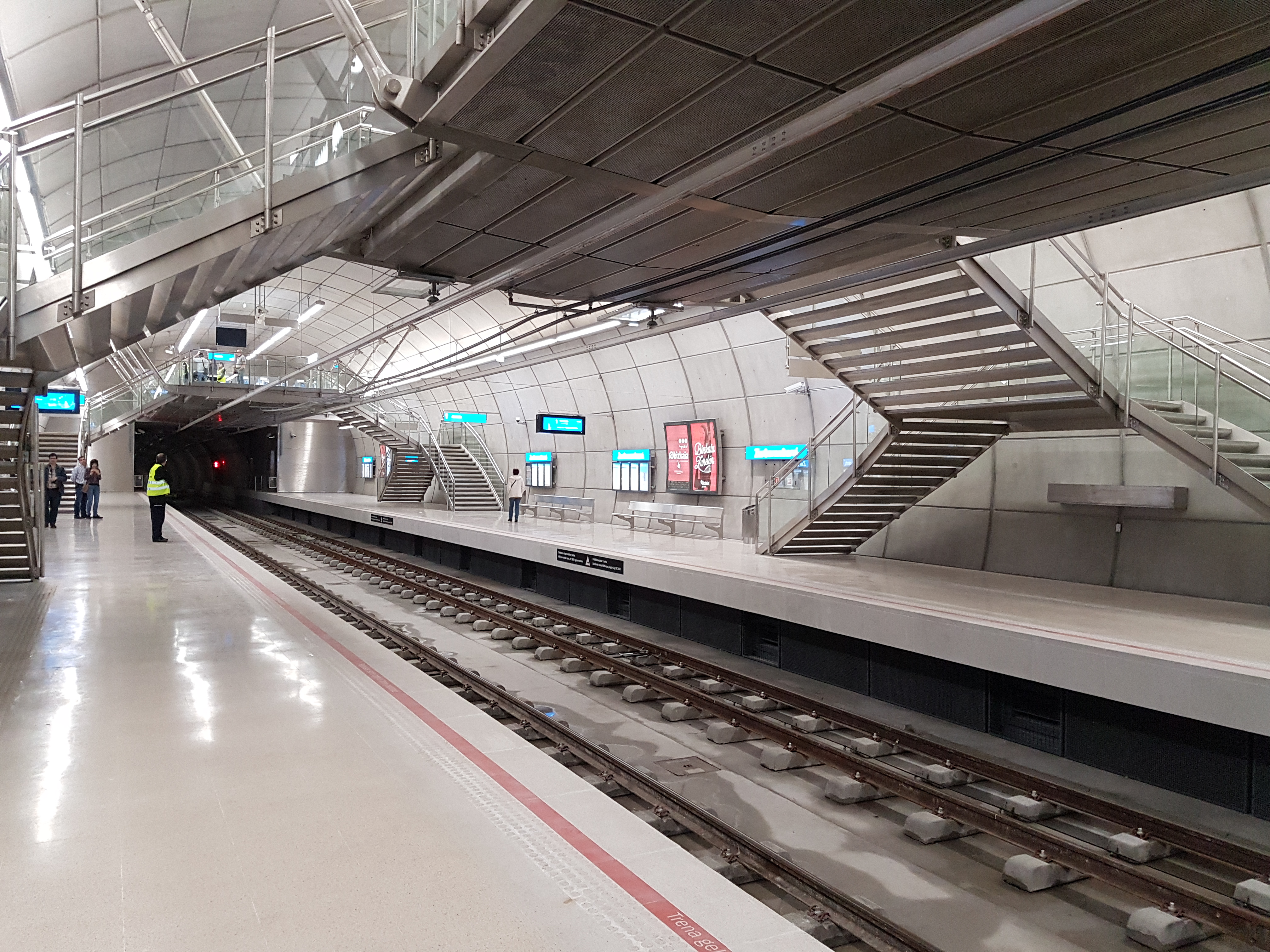 Estación de Zurbaranbarri.